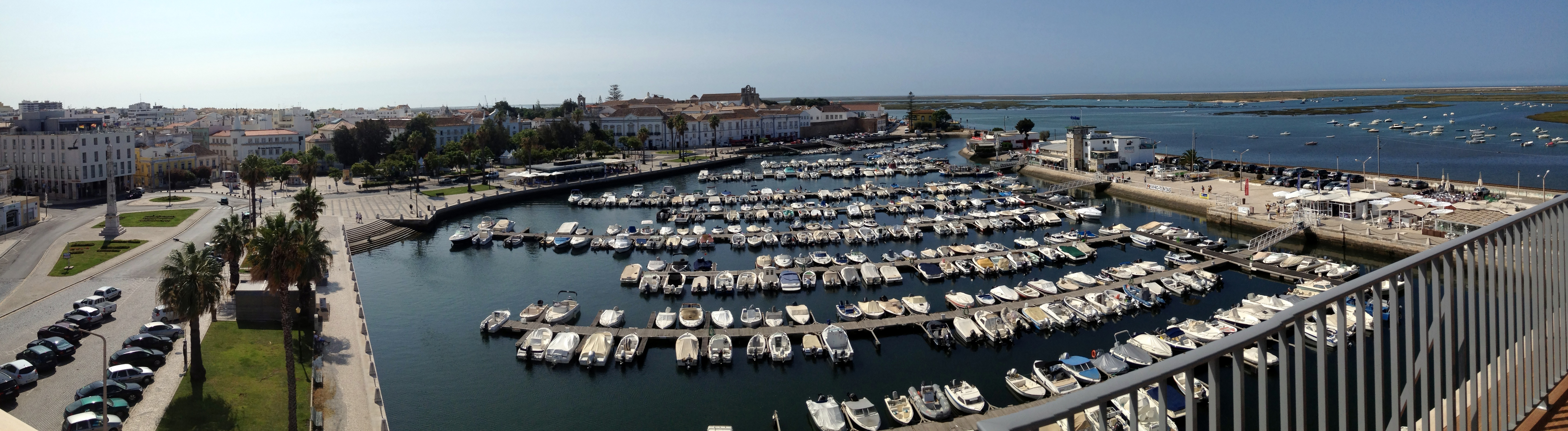 Marina de Faro.